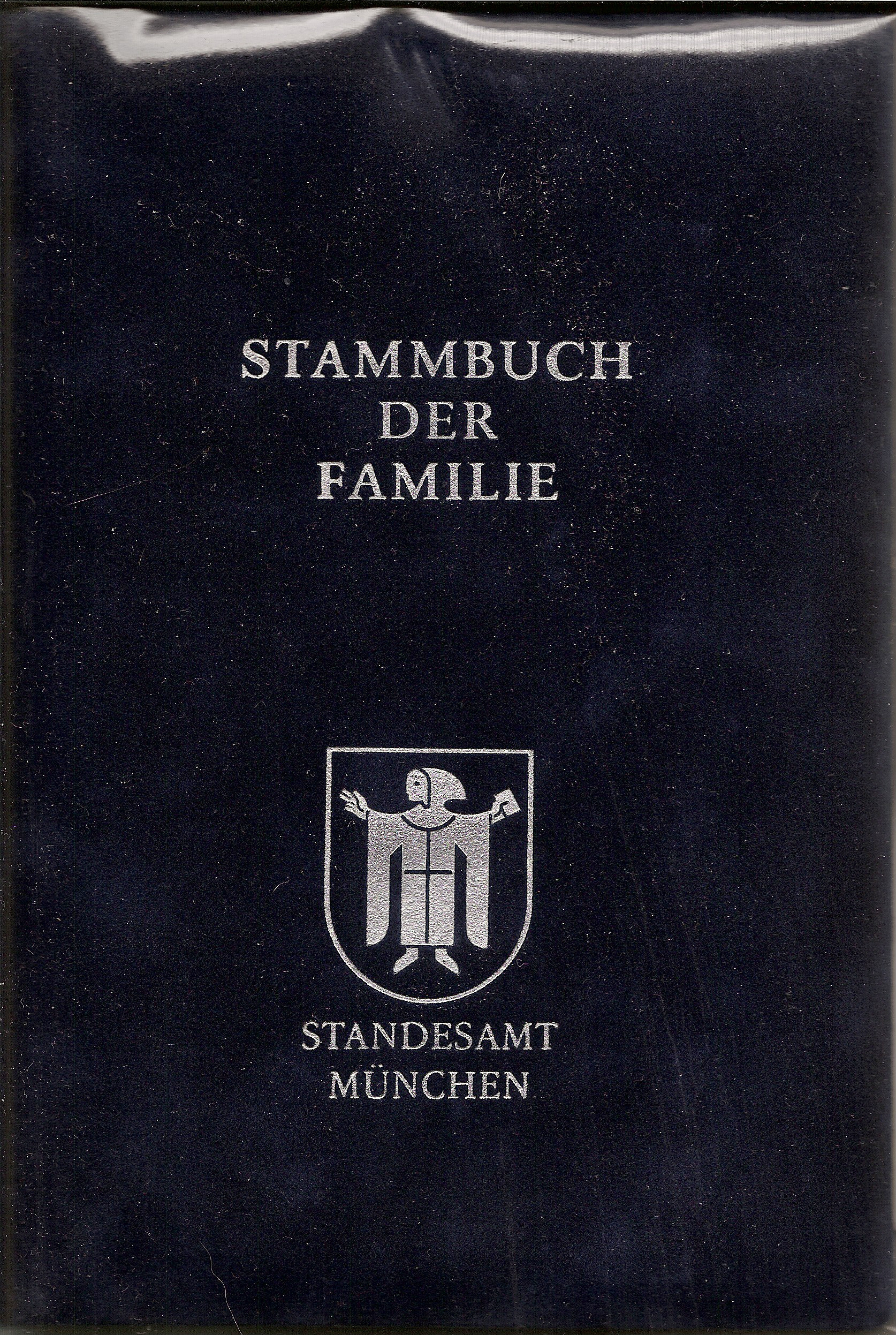 Stammbuch der Familie — Standesamt München (Samtumschlag; Ausführung in blau)